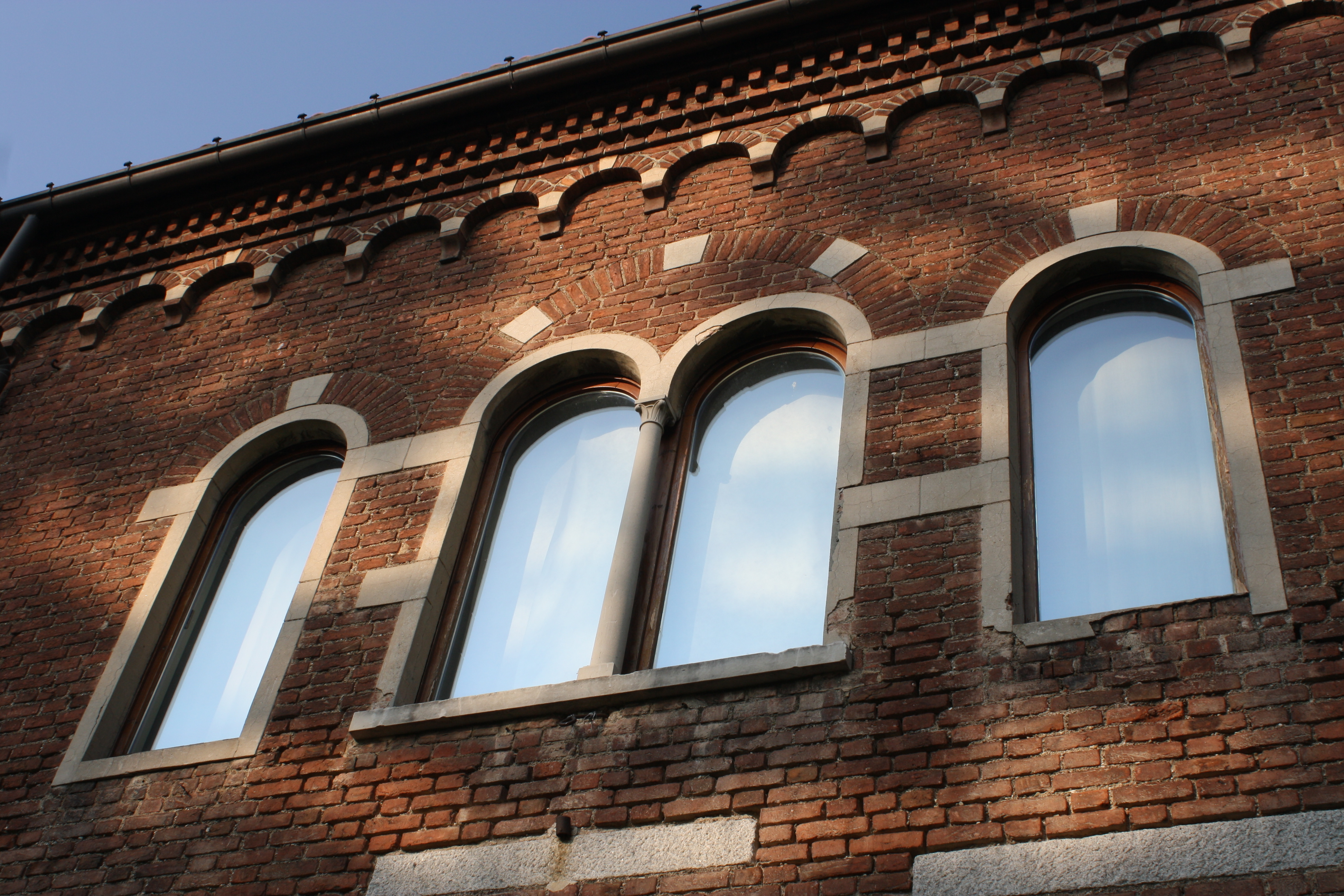 Palazzo Leone da Perego a Legnano: le finestre del primo piano della facciata principale This is a photo of a monument which is part of cultural heritage of Italy.